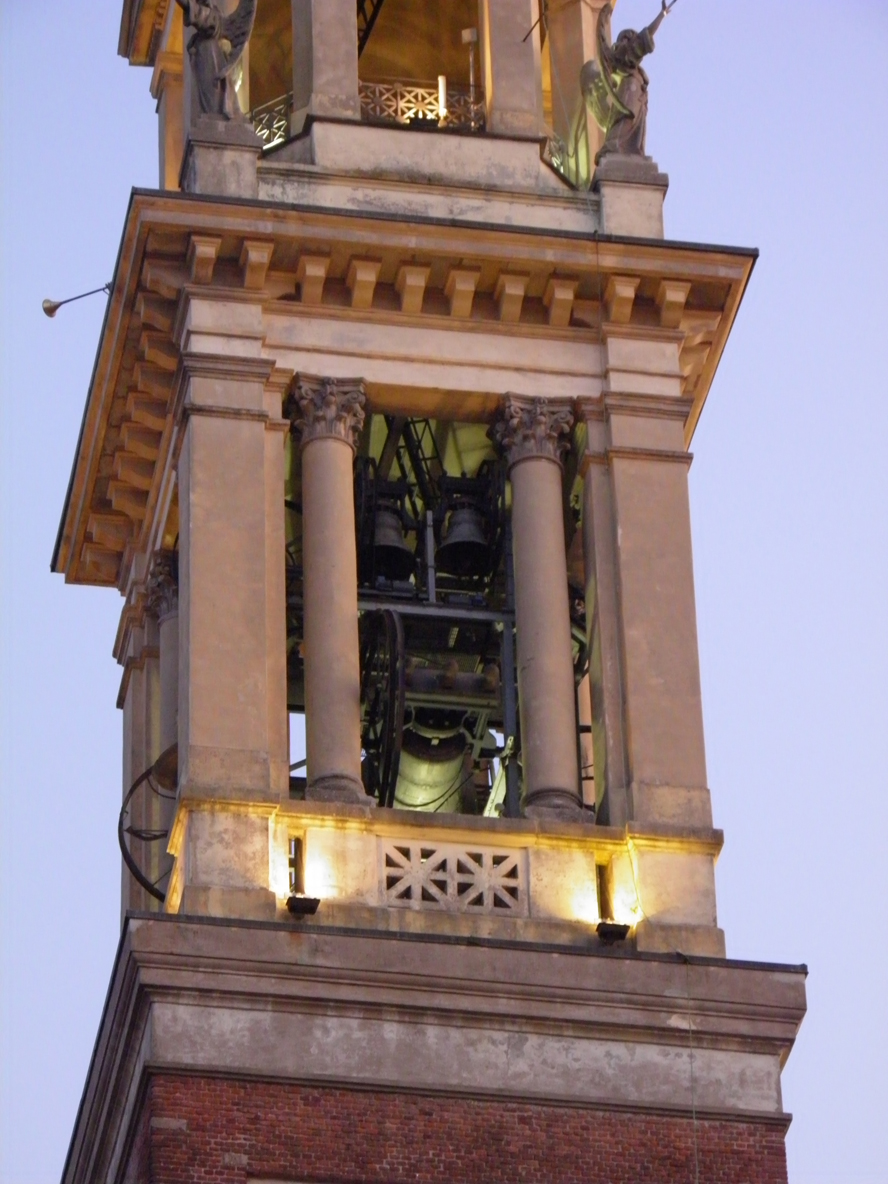 Le campane di Corbetta suonano a festa